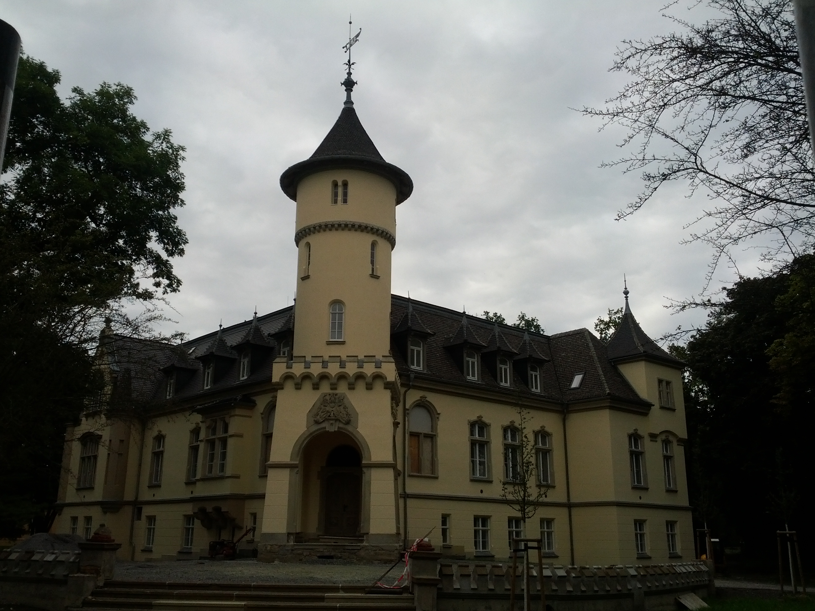 Denkmalgeschütztes Schloss Hohenbocka